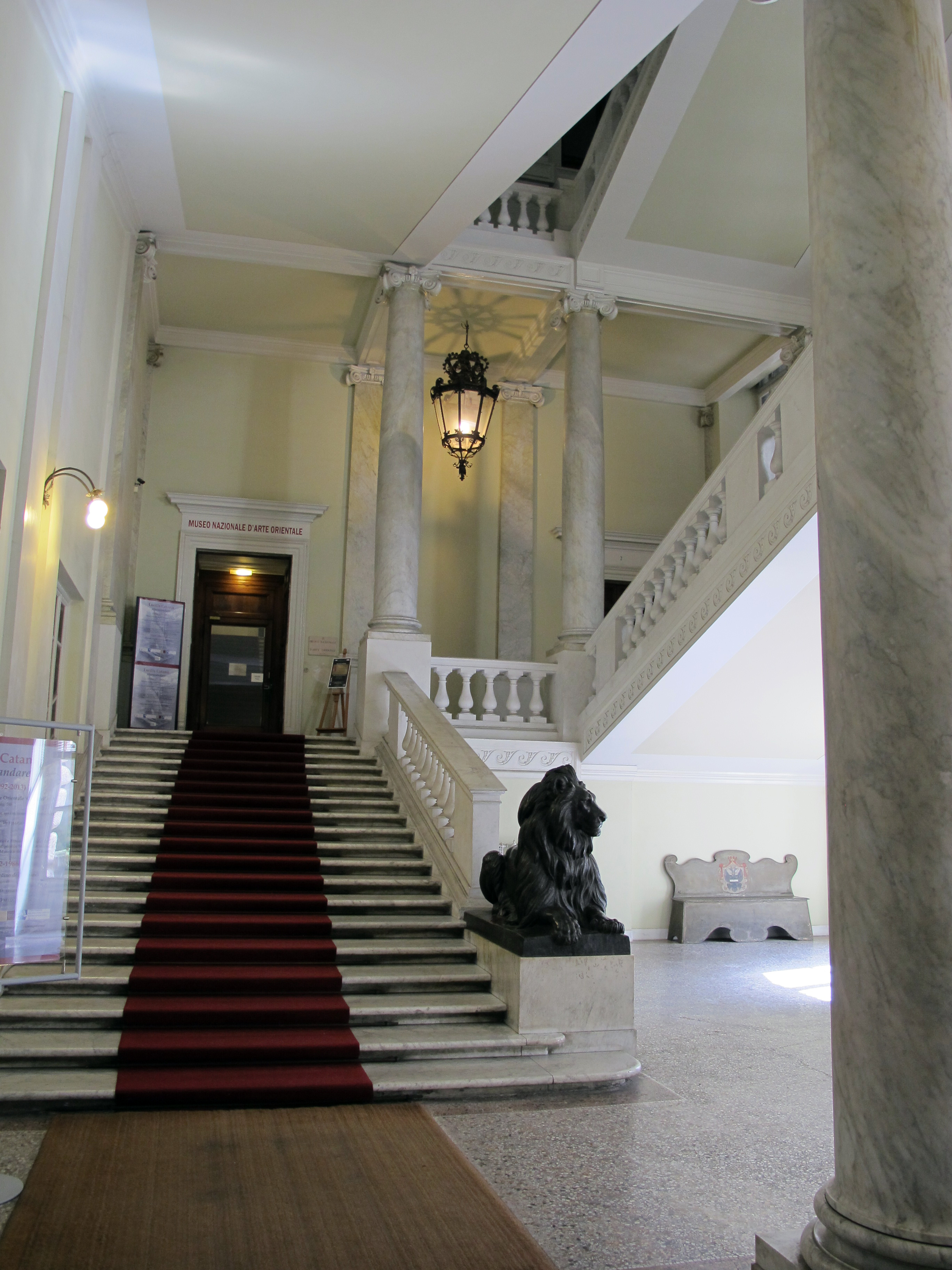 Palazzo brancaccio, scalone